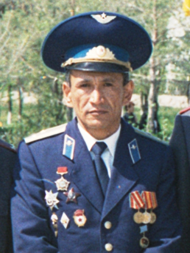 Комбриг 35-й огдшбр гвардии полковник Дюсекеев Мукан Естаевич. Капчагай. 9 мая 1996 года